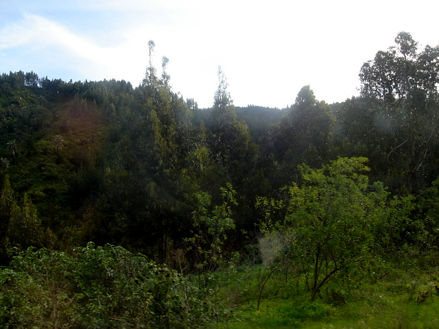 Paisaje rural de la Region Metropolitana, Chile. Foto tomada por Usuario:Der schöne Tod